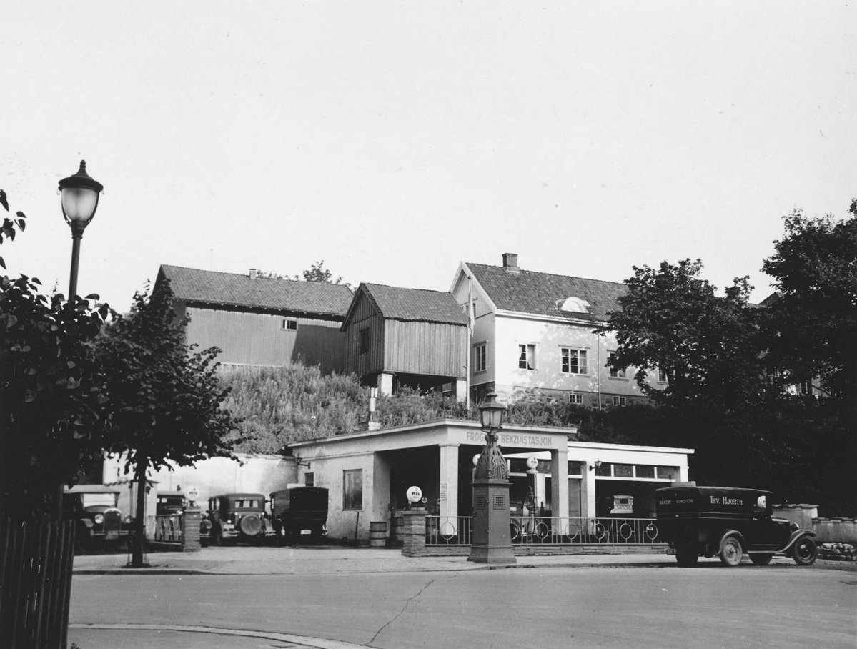 Frogner Benzinstasjon anno 1931. Foto: Ruth Raabe, fra Byhistorisk samling hos Oslo Museum.